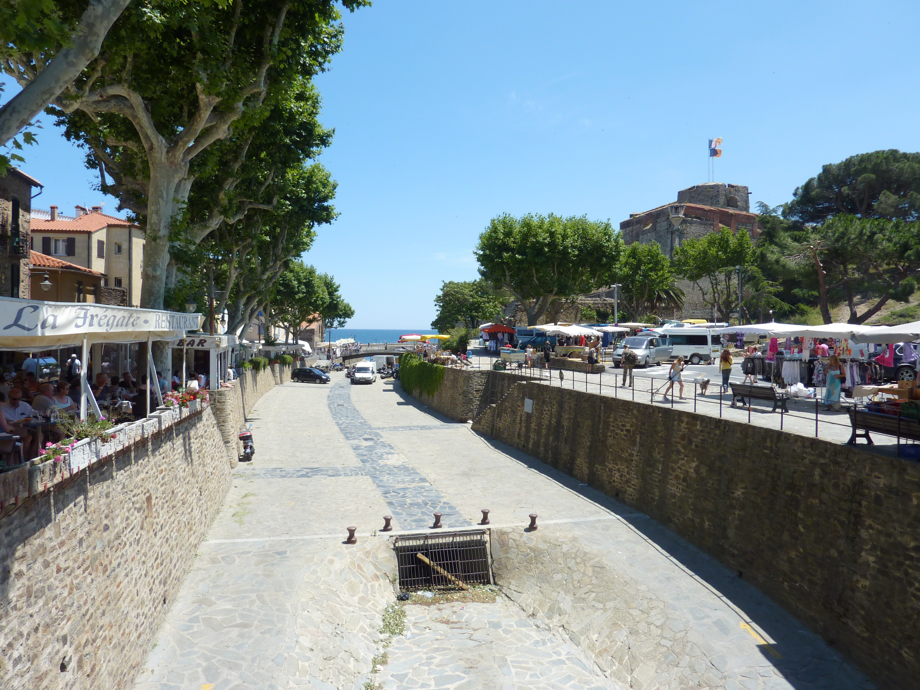 Collioure: torrent méditerranéen à sec